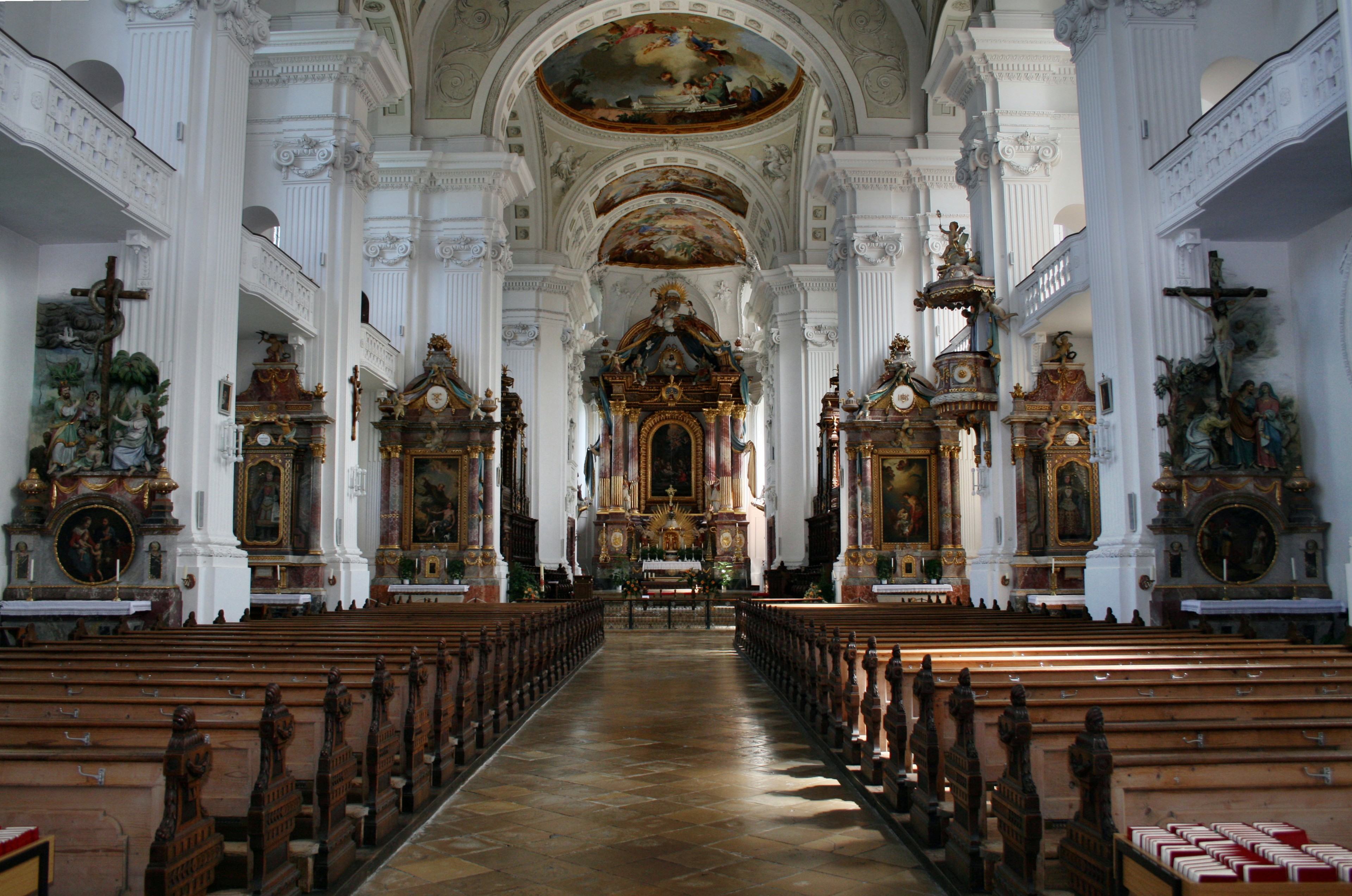 St Verena, Rot an der Rot